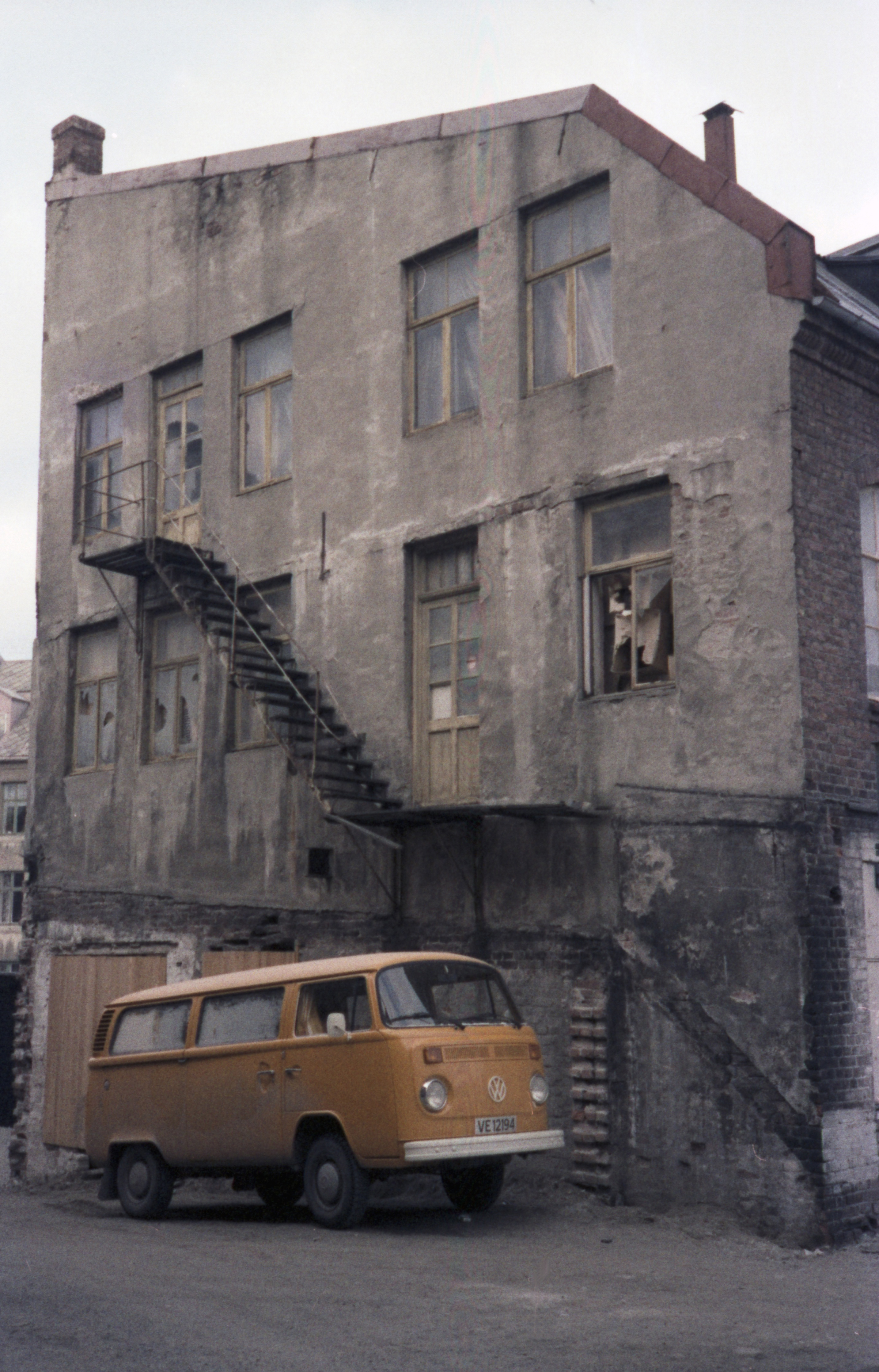 Format: 35 mm farge negativ Film: Kodak Safety Film 5075 Dato / Date: November 1979 Fotograf / Photographer: Ukjent Sted / Place: Trondheim Google Maps: bit.ly/wW7RaD Flyfoto 1937: bit.ly/yTA5np (Finn.no) Street View: bit.ly/xFdXB9 Eier / Owner Institution: Trondheim byarkiv, The Municipal Archives of Trondheim Arkivreferanse / Archive reference: Tor.H43.P1.F5818, film 36 Merknad: Fra Byantikvarens negativsamling. Nordenfjeldske Papirindustri Her stod Nordenfjeldske Papirindustri, en tidligere industribedrift i Ulstadløkkveien 5. Fabrikken ble grunnlagt i 1915 av Ole Moe og produserte papirposer, merkelapper og matpapir med mer. Fabrikken ble nedlagt i 1966. (Kilde: Trondheim Byleksikon 2008)